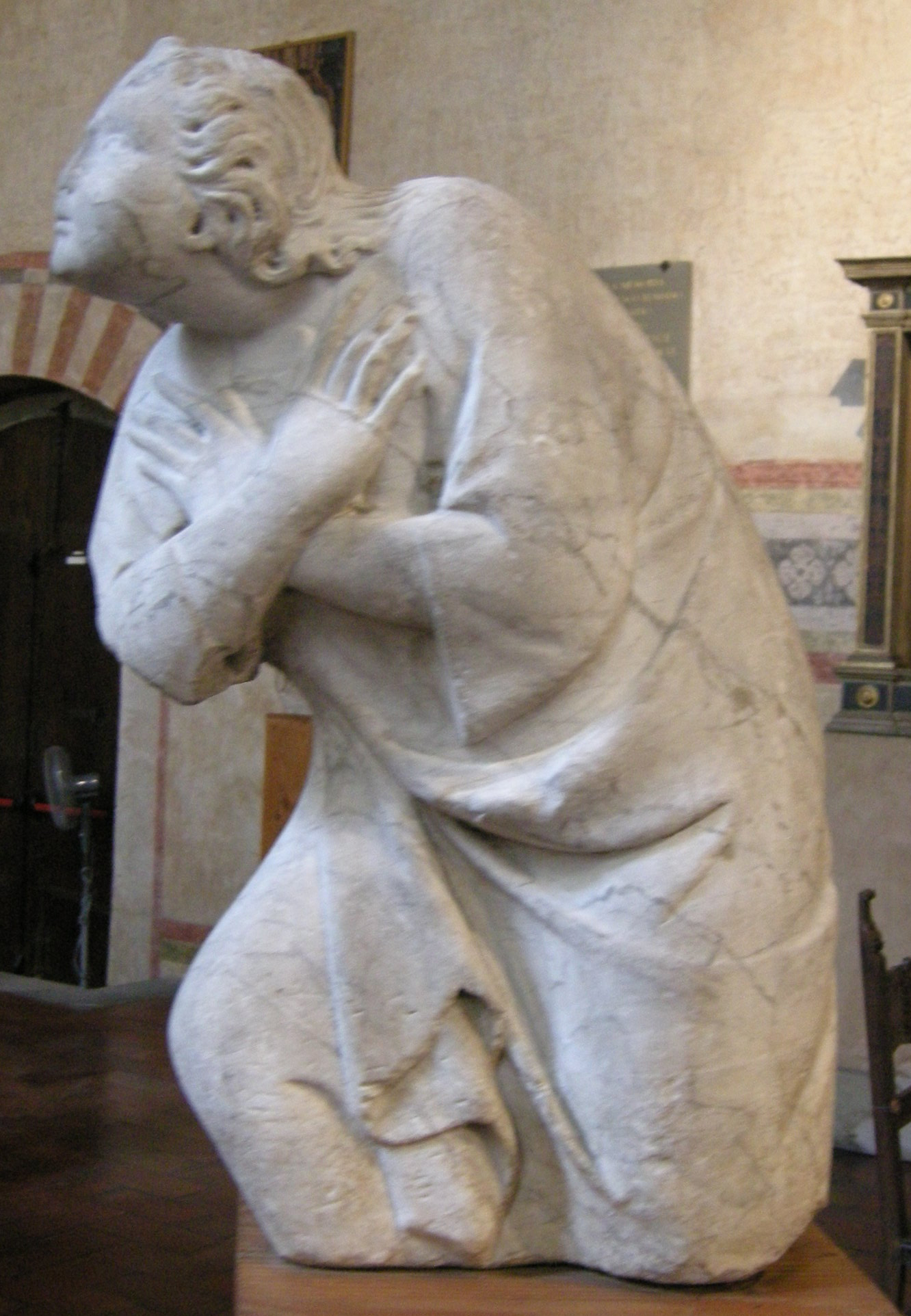 Tino di camaino, angelo, 1300-1325 ca., da palazzo bargagli petrucci tempi, fi